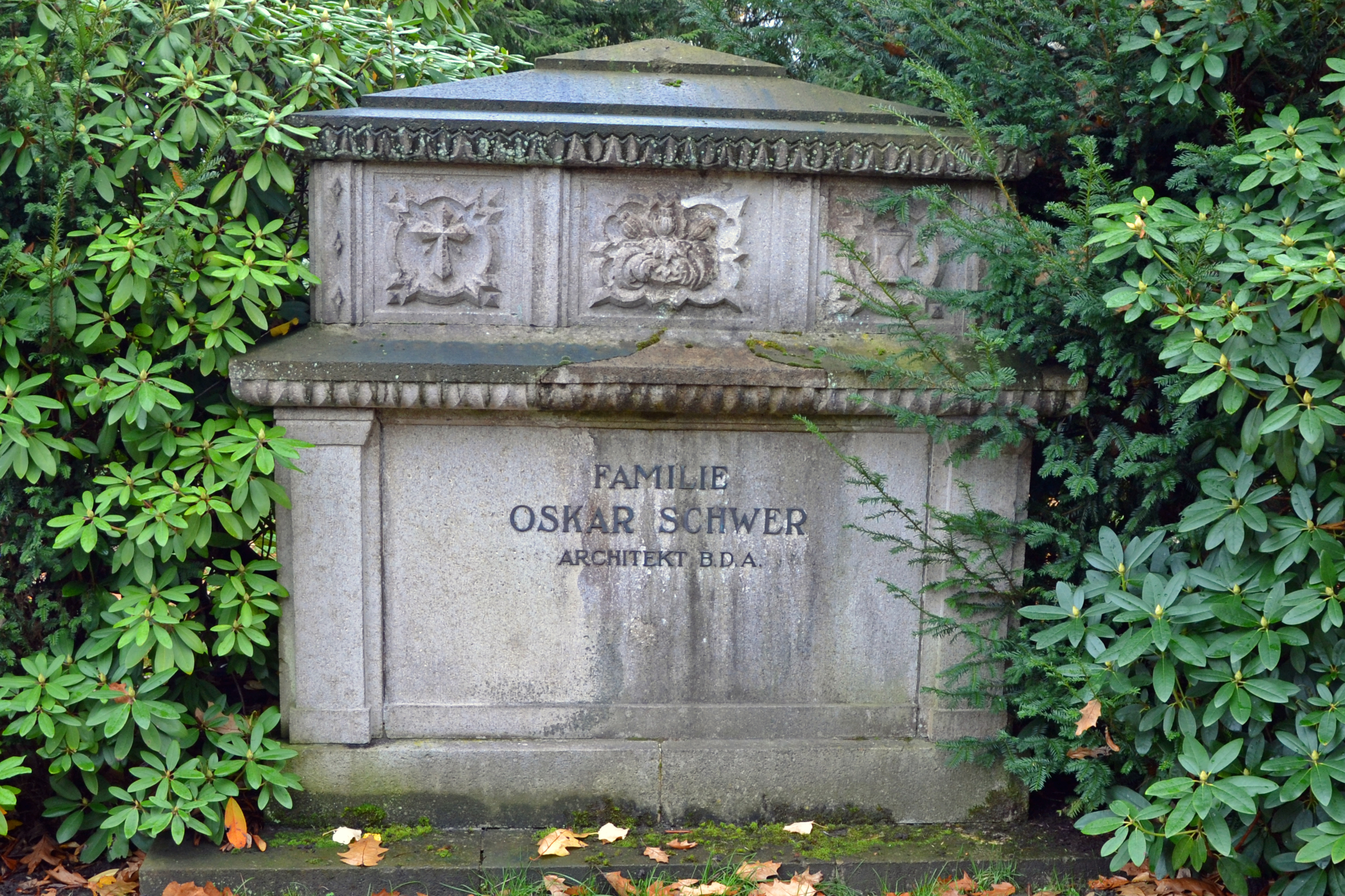 Friedhof Essen-Bredeney, Grabmal des deutschen Architekten Oskar Schwer